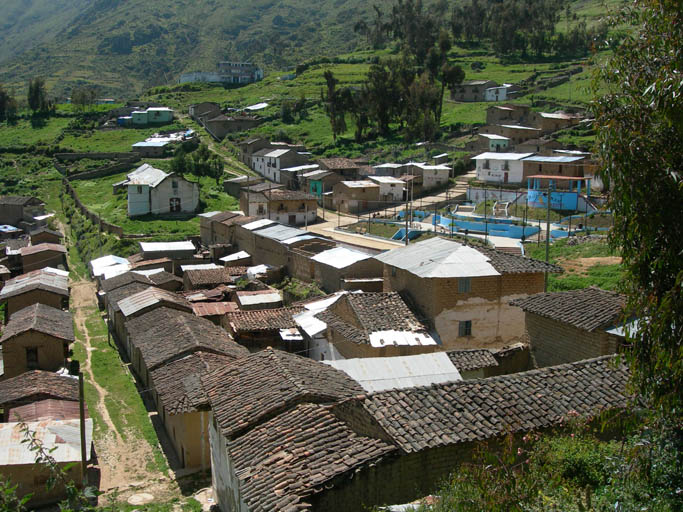 Kočiapečio miestelis.